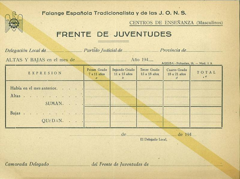 Ficha del Frente de Juventudes en el Archivo Municipal de Pradejón.